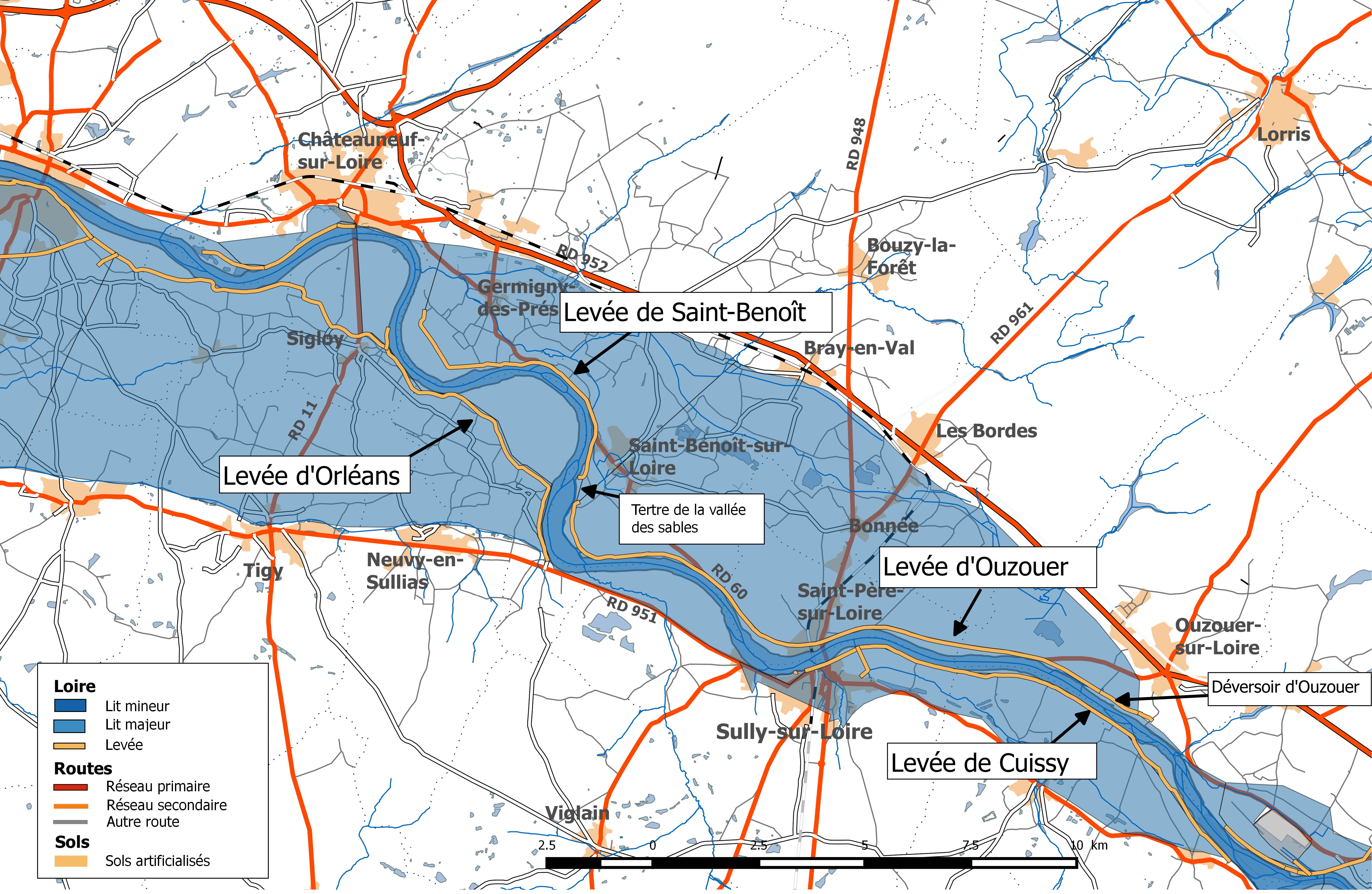 Système d'endiguement de la Loire dans le département du Loiret. Val d'Ouzouer.